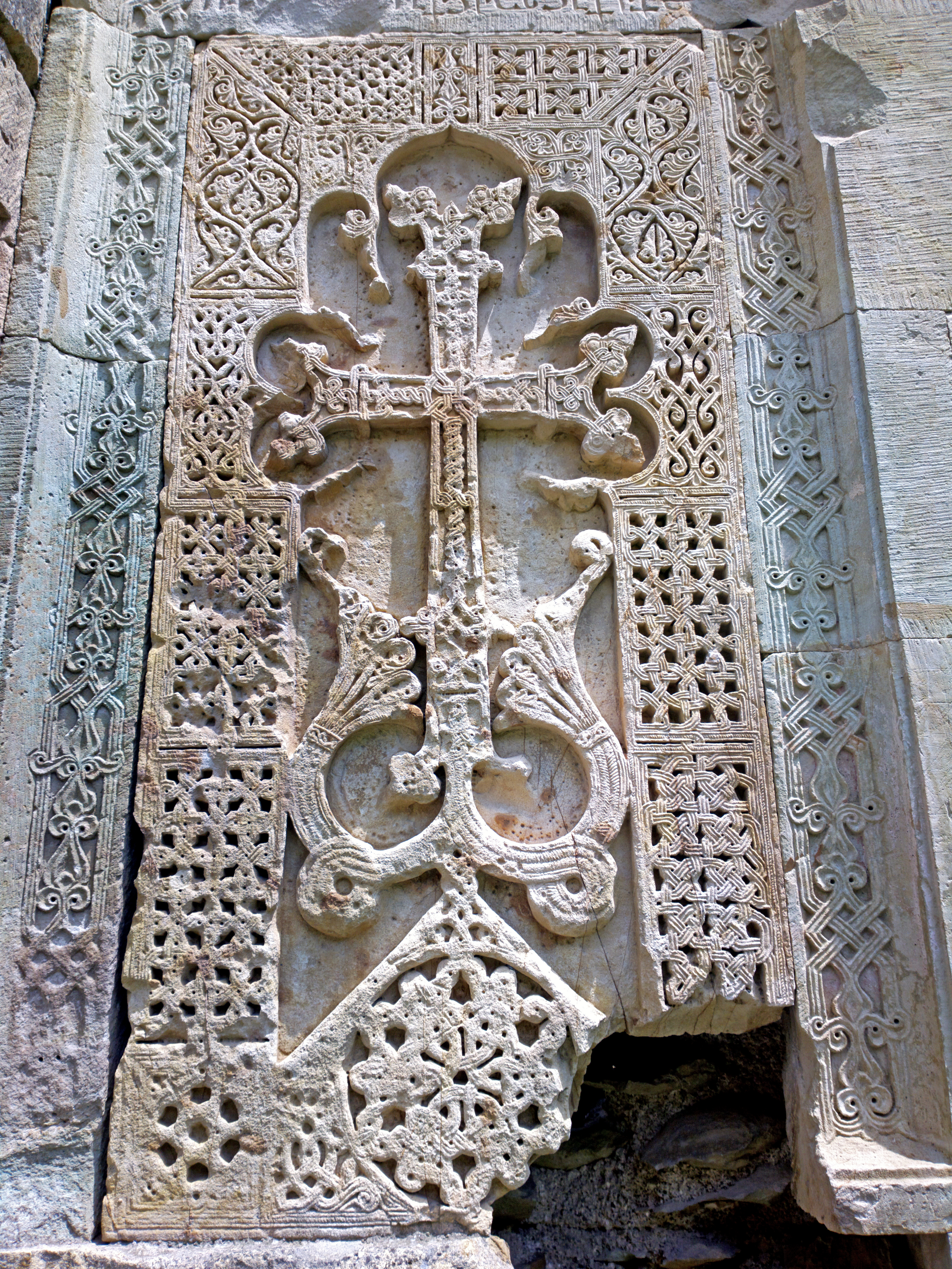 Վանական Համալիր Նոր Վարագավանք (Անապատ) 60/10